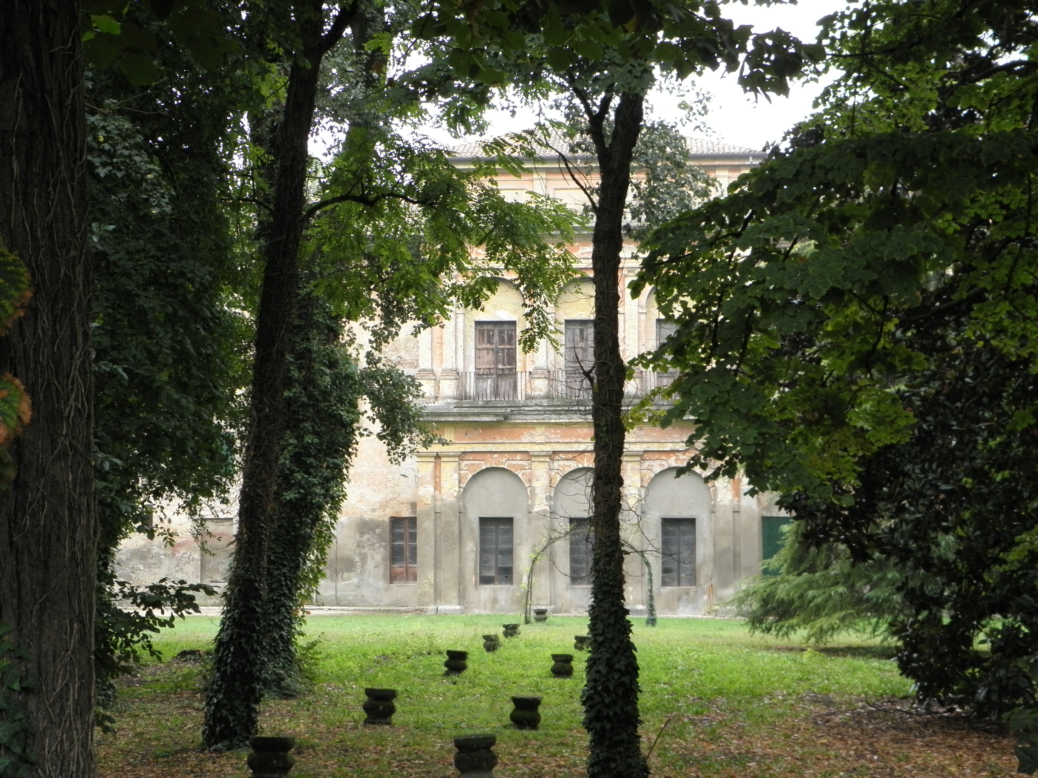 Villa dei Principi Pio Falcò ora Longhi (secolo XVII con ristrutturazione nel secolo XIX), Crespino, provincia di Rovigo.